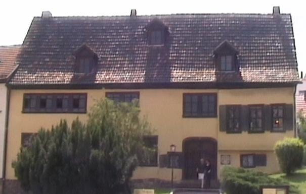 Das Bachhaus in Eisenach